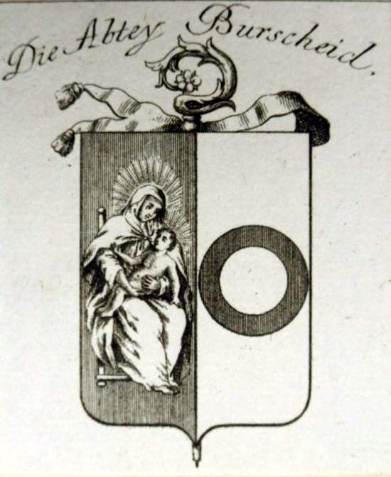 altes Wappen der Abtei Burtscheid in Aachen-Burtscheid; Kupferstich von Franz Johann Joseph von Reilly 1791